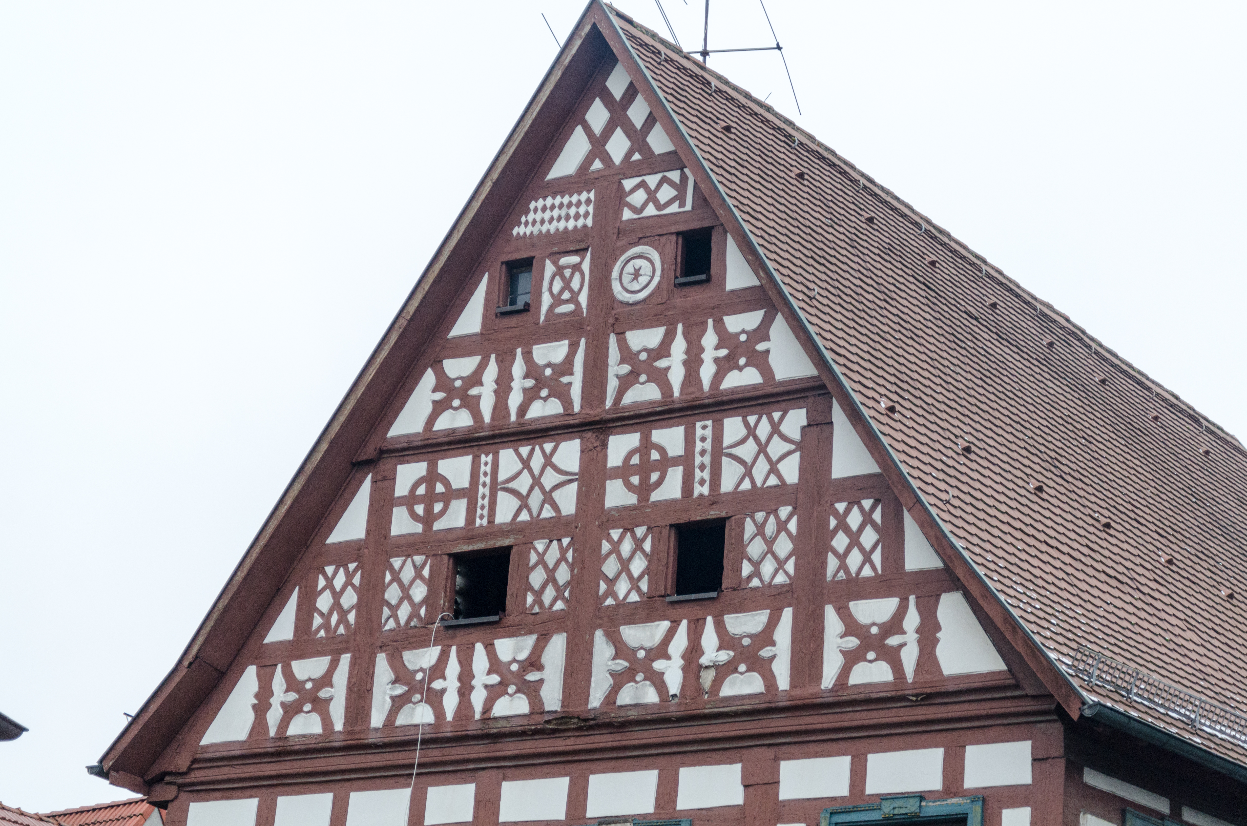 Weismain, Am Markt 16a, 004